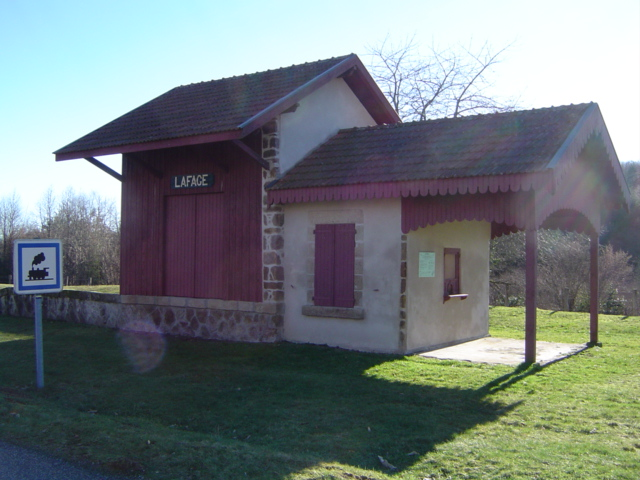 Gare de Lafage sur Sombre, en service pour le Transcorrézien jusqu'en 1969. Elle fait partie aujourd'hui du patrimoine culturel et historique du village.